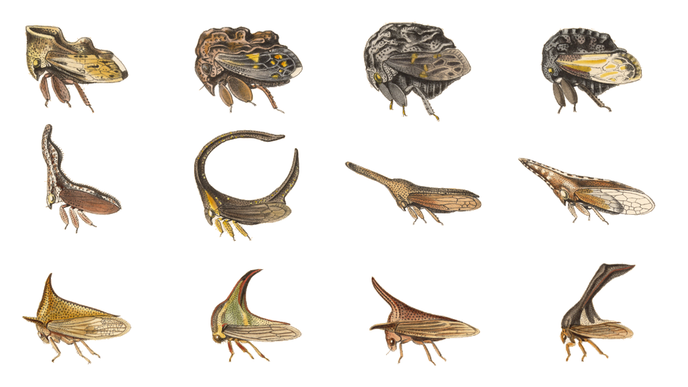 Membracidae Plate